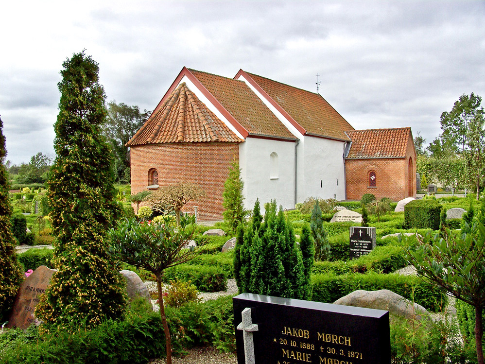 fra nordøst